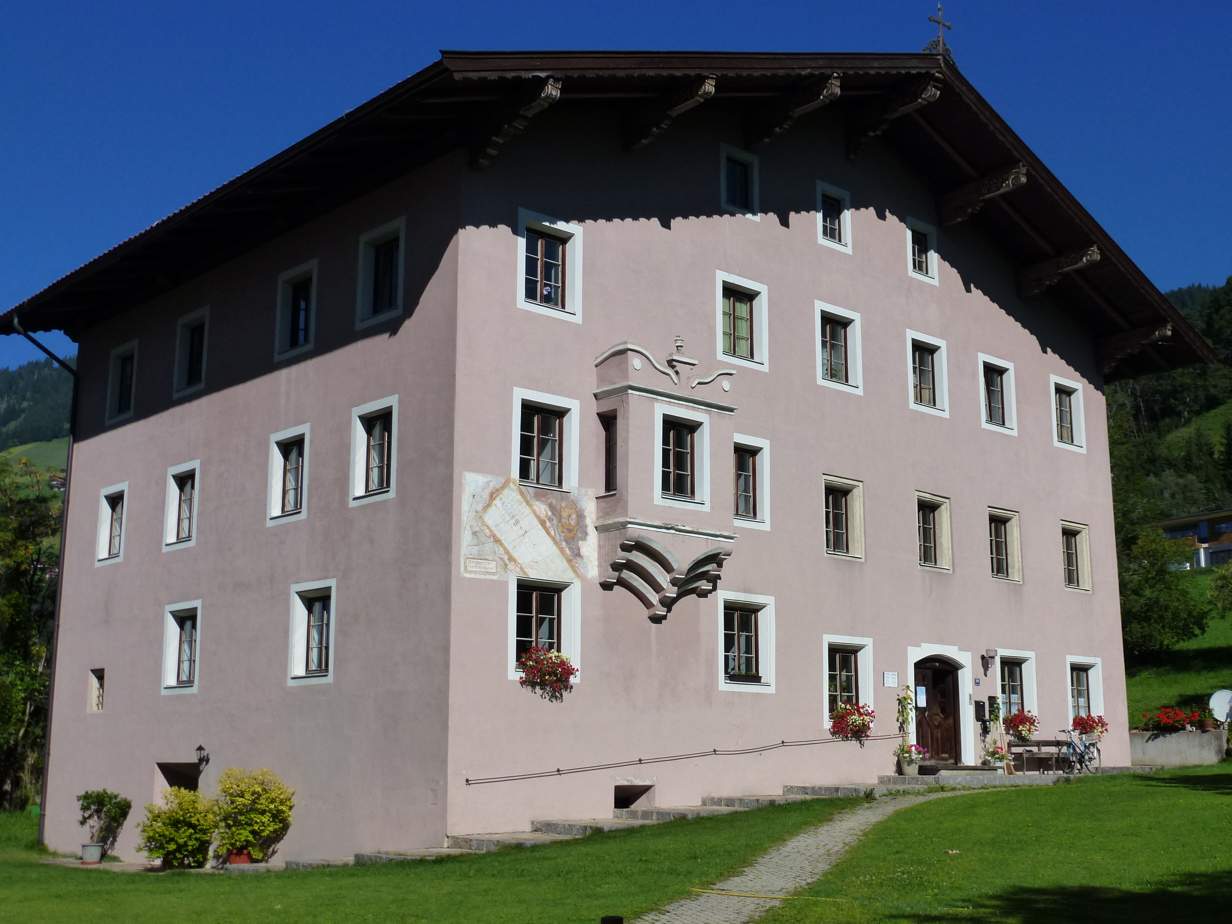 Widum - Dorfstraße 88, Brixen im Thale